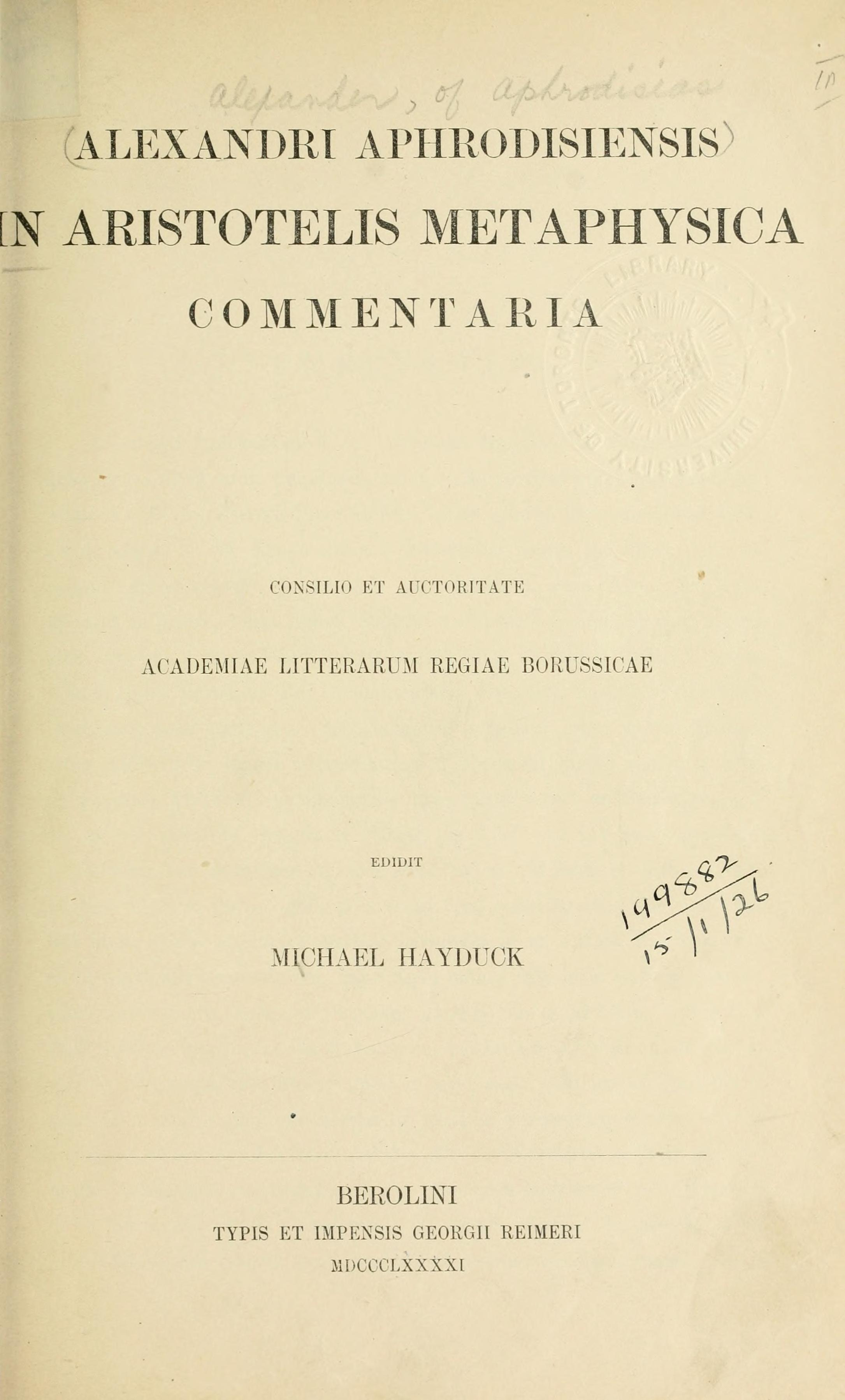 Первая страница издания Commentaria in Aristotelem Graeca. Александра Афродисийского комментарий на "Метафизику" Аристотеля